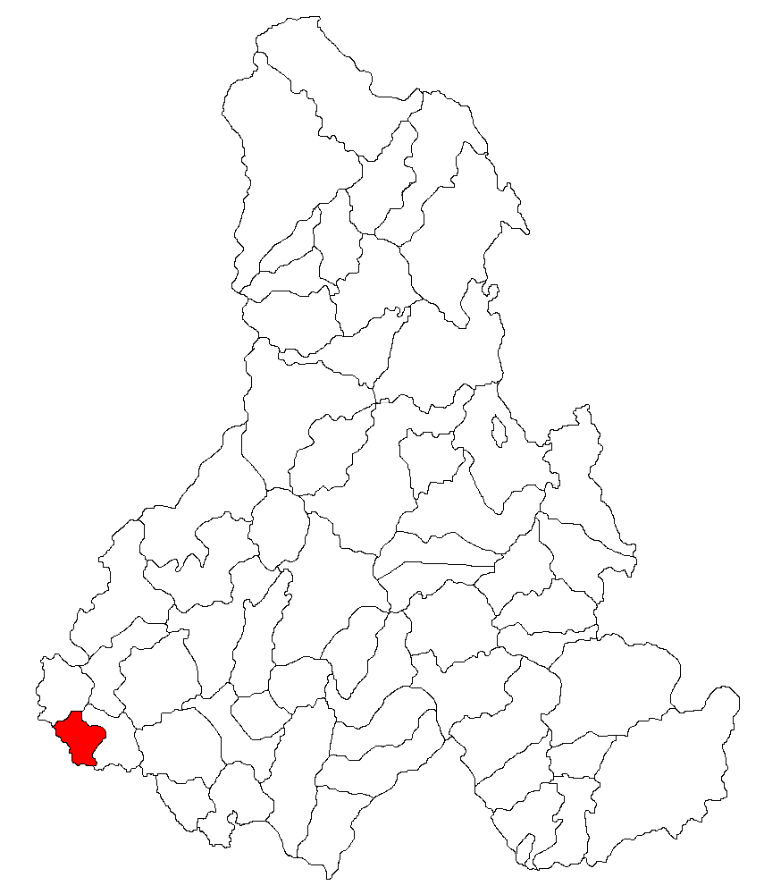 Categorie:Hărţi ale judeţului Harghita Contents 1 Licensing 2 Sursă 3 Licensing 4 Original upload log Licensing Sursă ro::Imagine:Harta_jud_Harghita.png